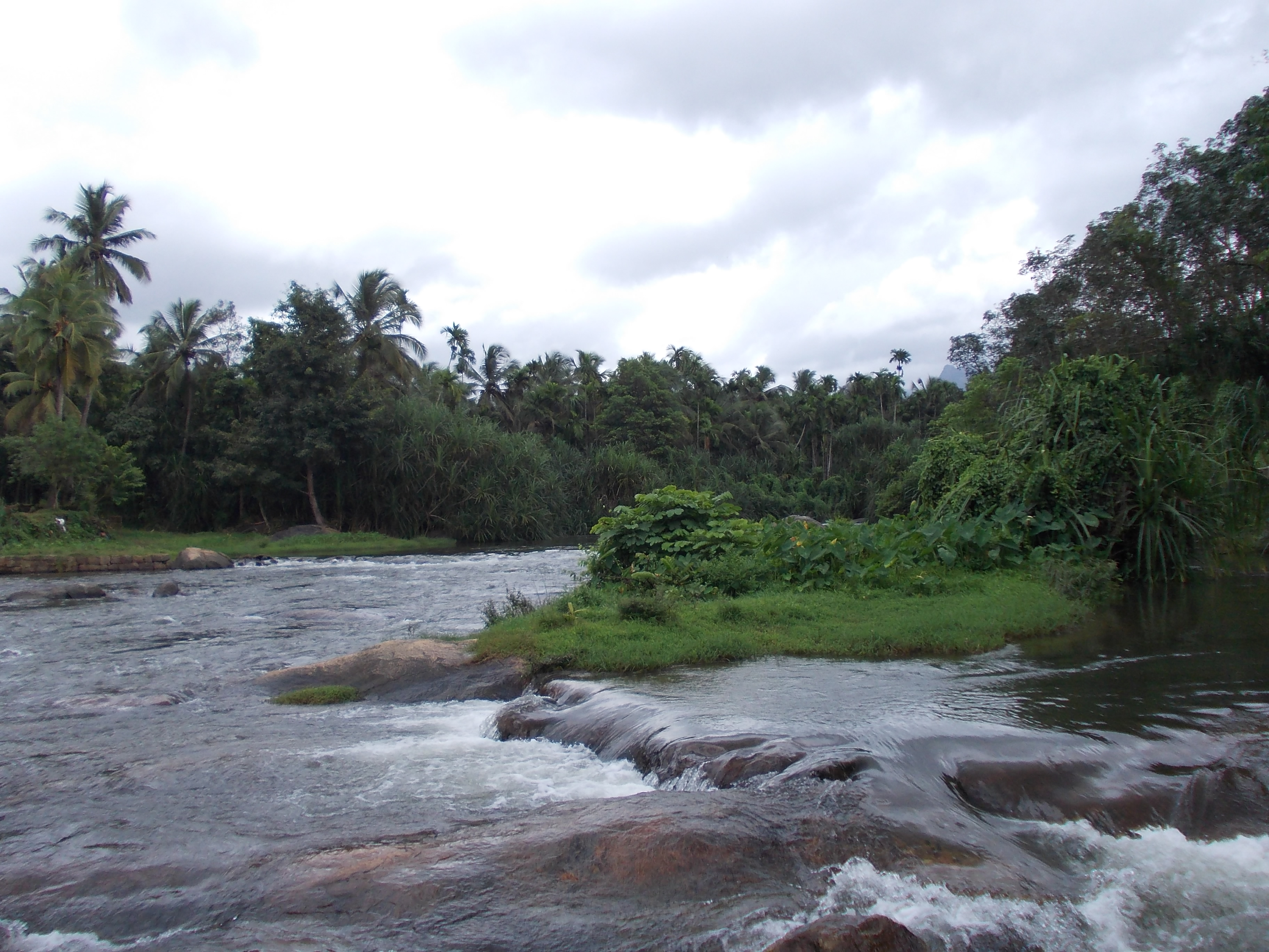 വെള്ളിയാർപുഴ തിരുവിഴാംകുന്ന്